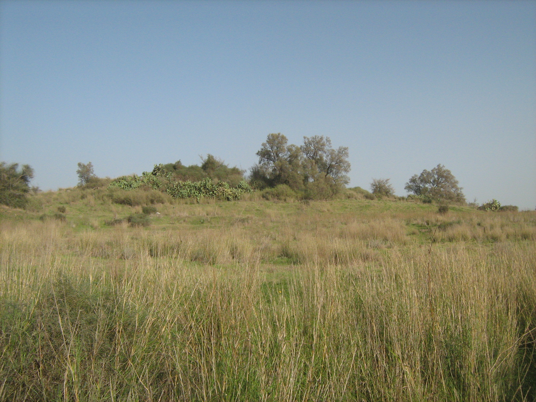 תל אשדוד